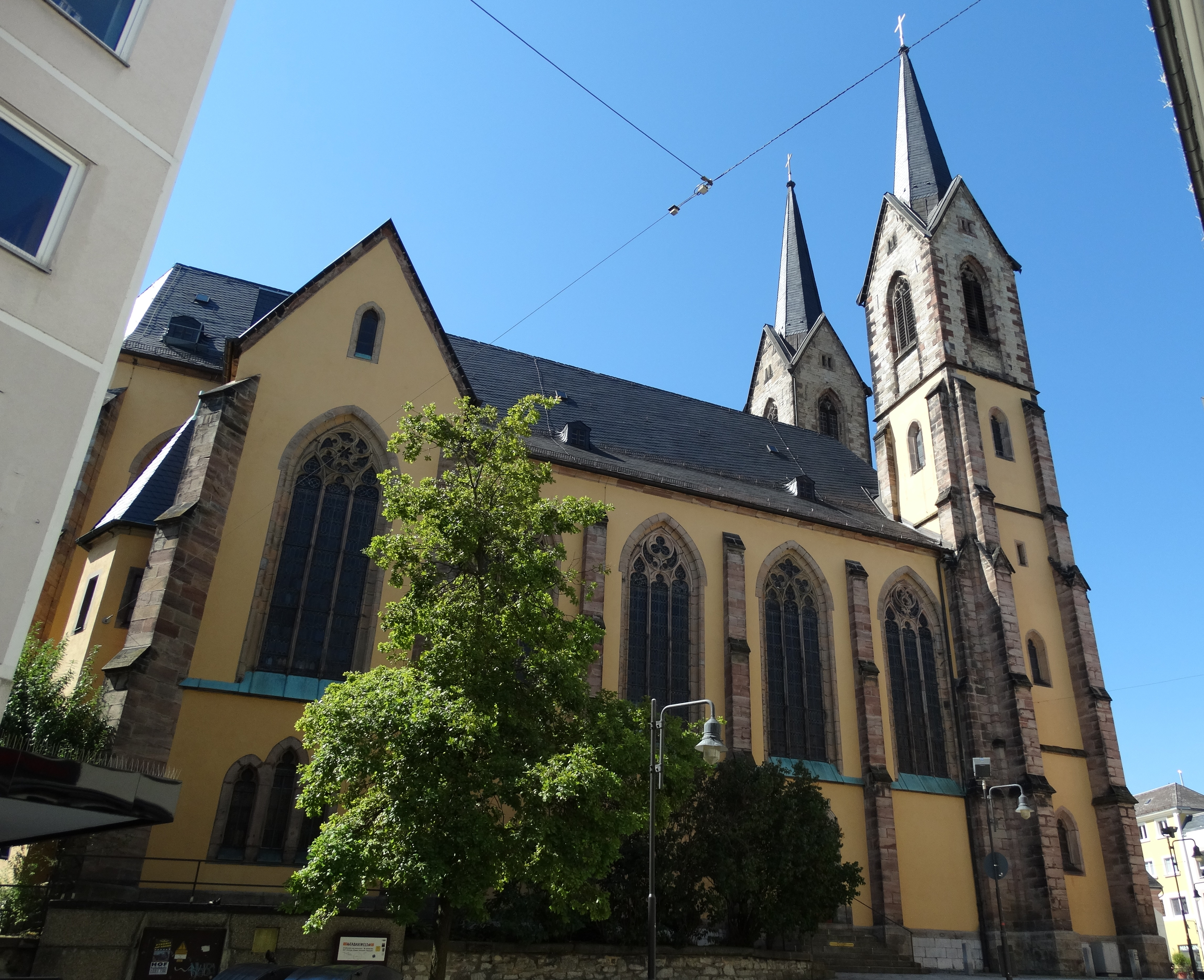 St. Marienkirche von der Lorenzstraße